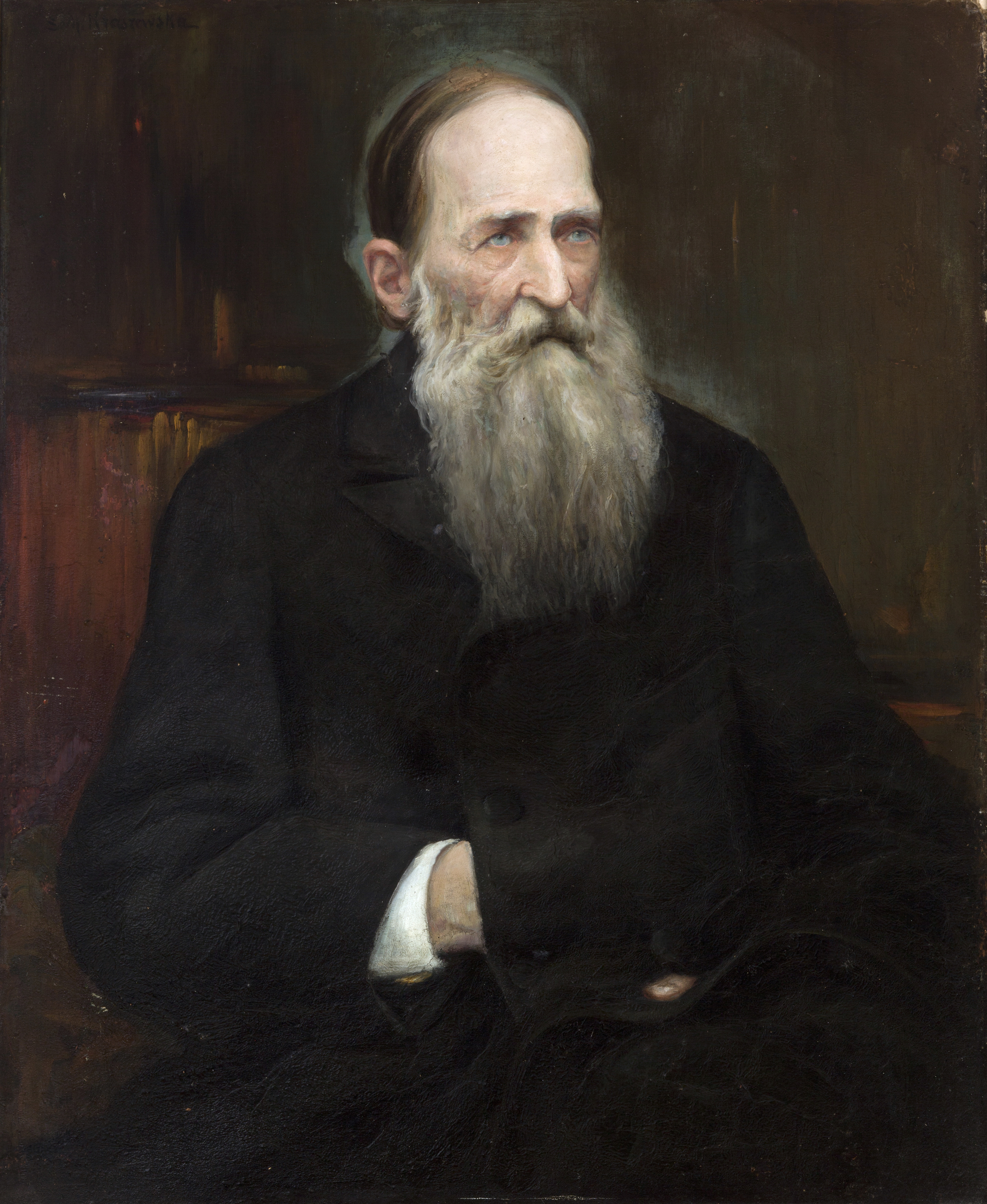 Беларуская (тарашкевіца): Партрэт Юзэфа Ігната Крашэўскага (Juzef Ihnat Krašeŭski)